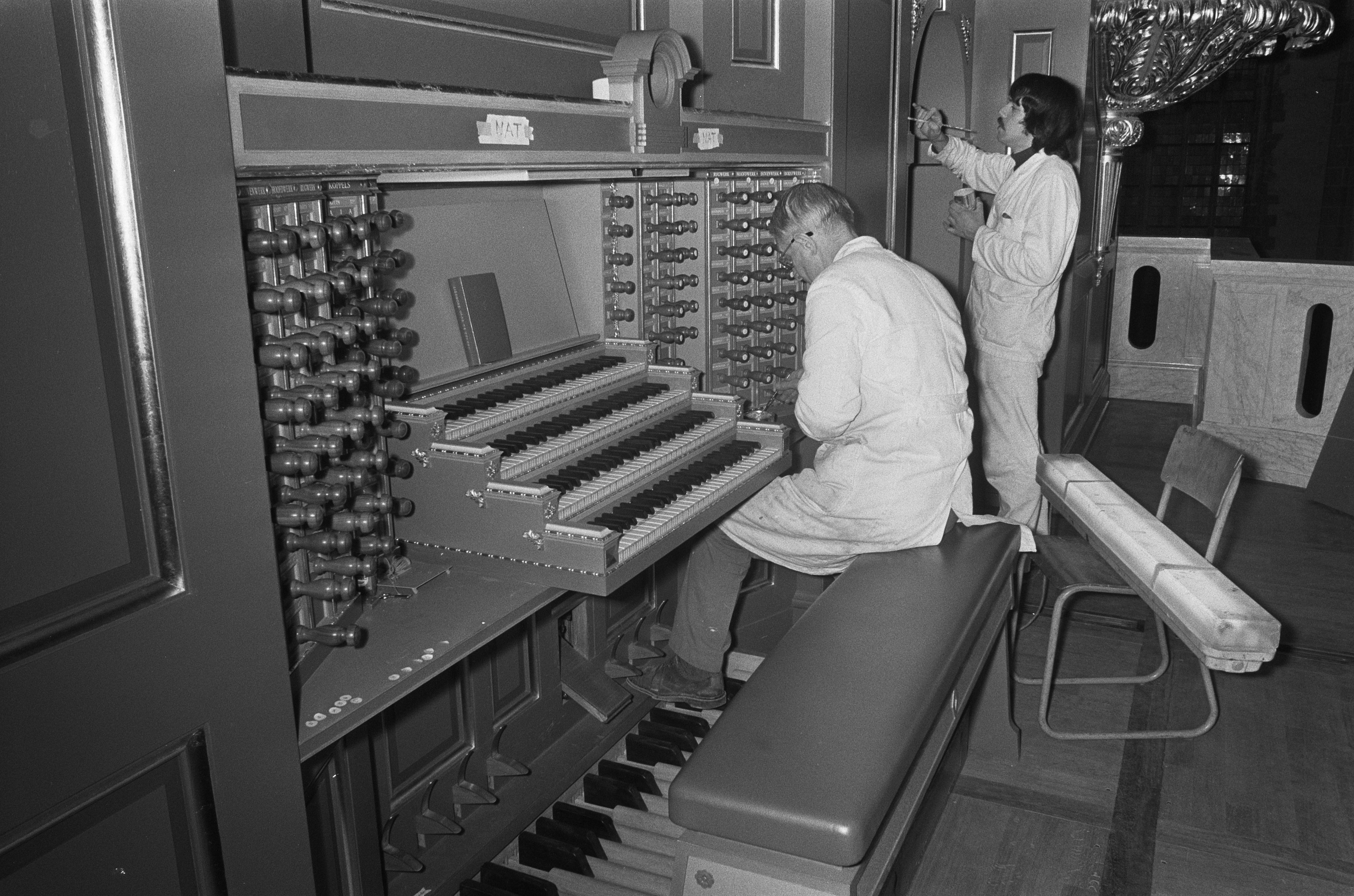 Collectie / Archief : Fotocollectie Anefo Reportage / Serie : Het nieuwe orgel van de St. Laurenskerk te Rotterdam Beschrijving : Schilders aan het werk aan het toetsenbord Datum : 6 december 1973 Locatie : Rotterdam, Zuid-Holland Trefwoorden : orgels, schilders, toetsenborden Instellingsnaam : Sint-Laurenskerk Fotograaf : Fotograaf Onbekend / Anefo Auteursrechthebbende : Nationaal Archief Materiaalsoort : Negatief (zwart/wit) Nummer archiefinventaris : bekijk toegang 2.24.01.05 Bestanddeelnummer : 926-8718